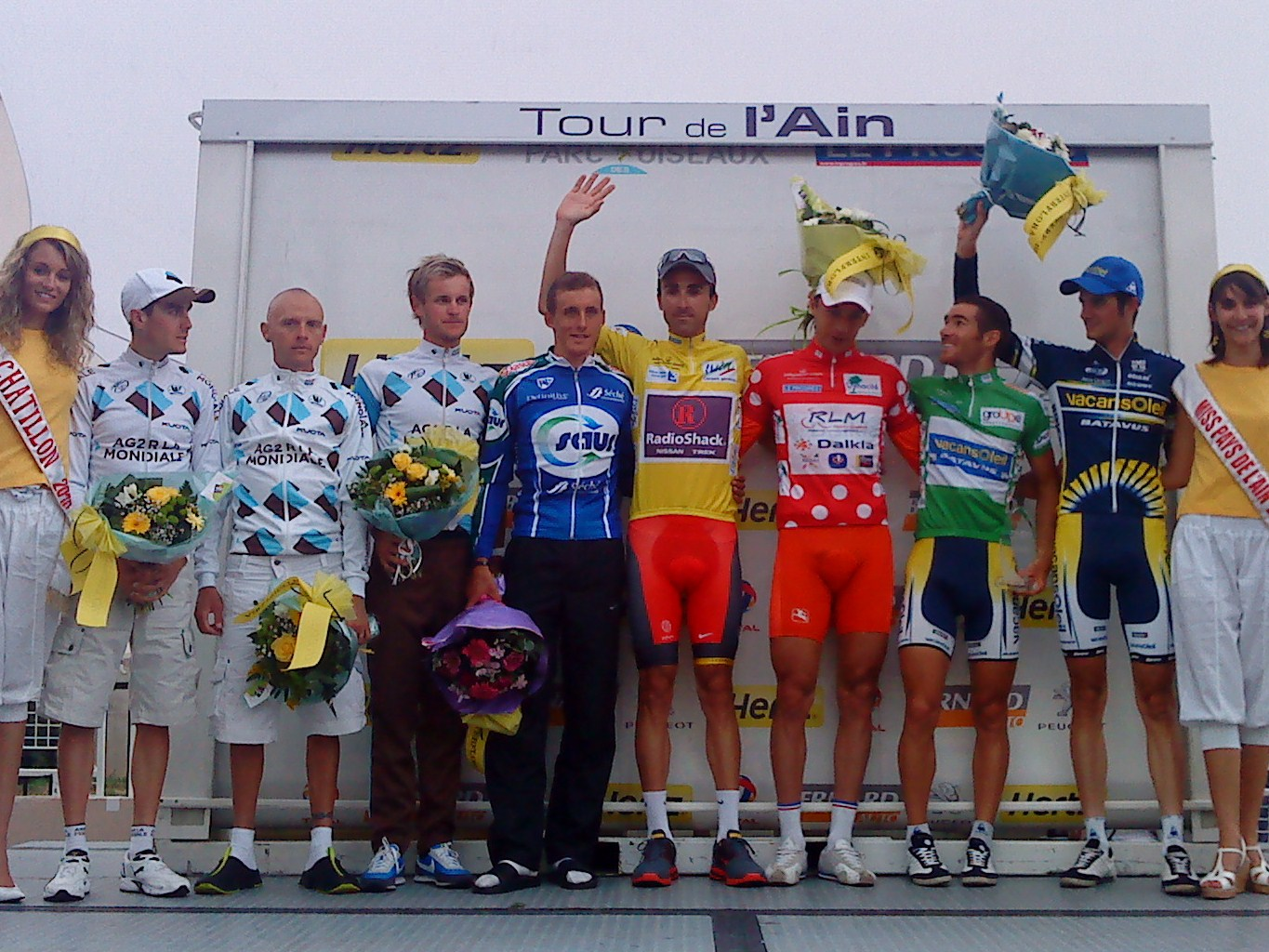 Ensemble des leaders de classement du Tour de l'Ain 2010